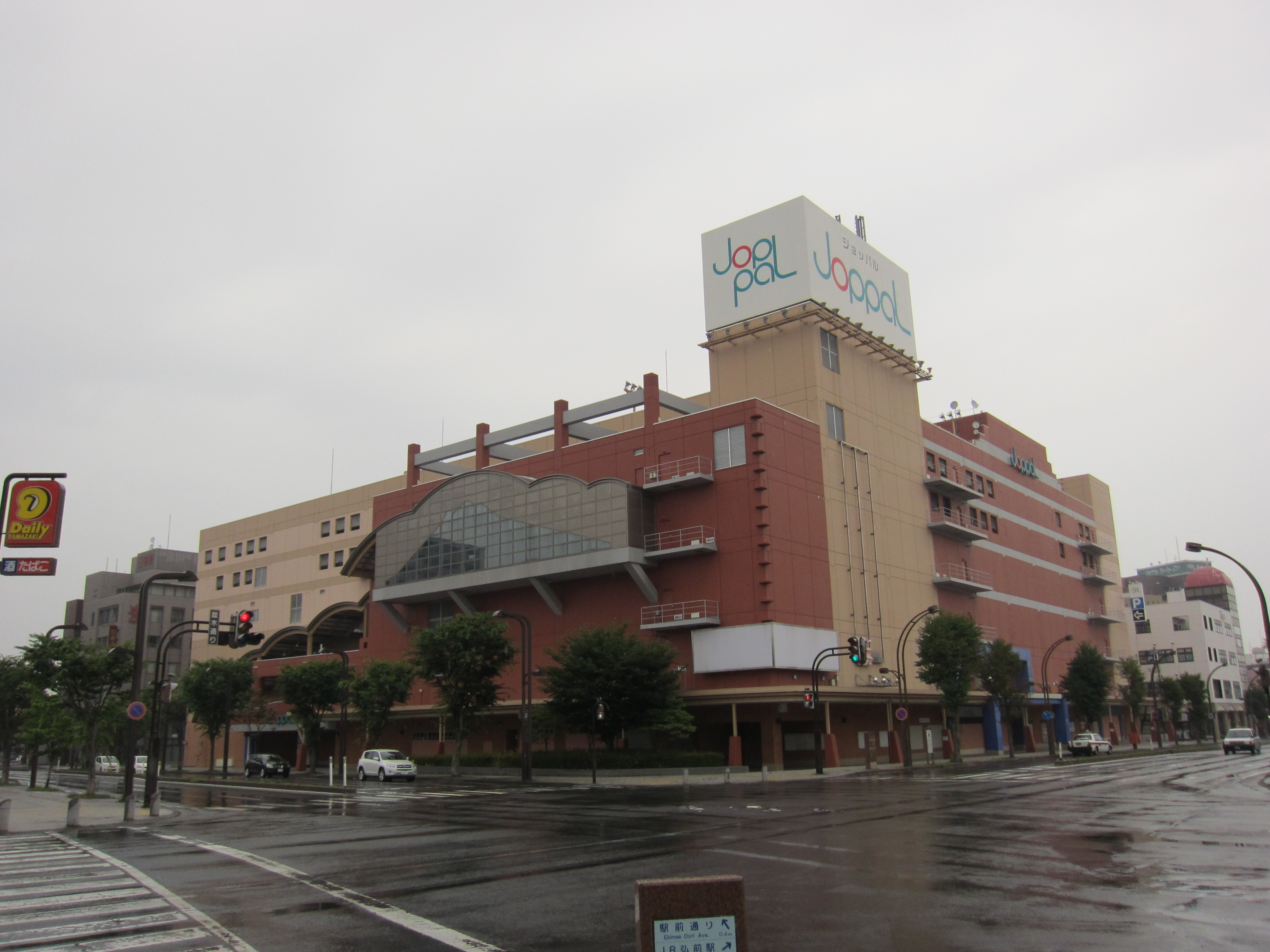 閉鎖された弘前市の複合商業施設ジョッパル （2012/08/13）